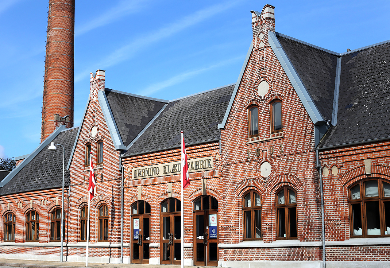 Tekstilmuseet i Herning. En del af Museum Midtjylland.